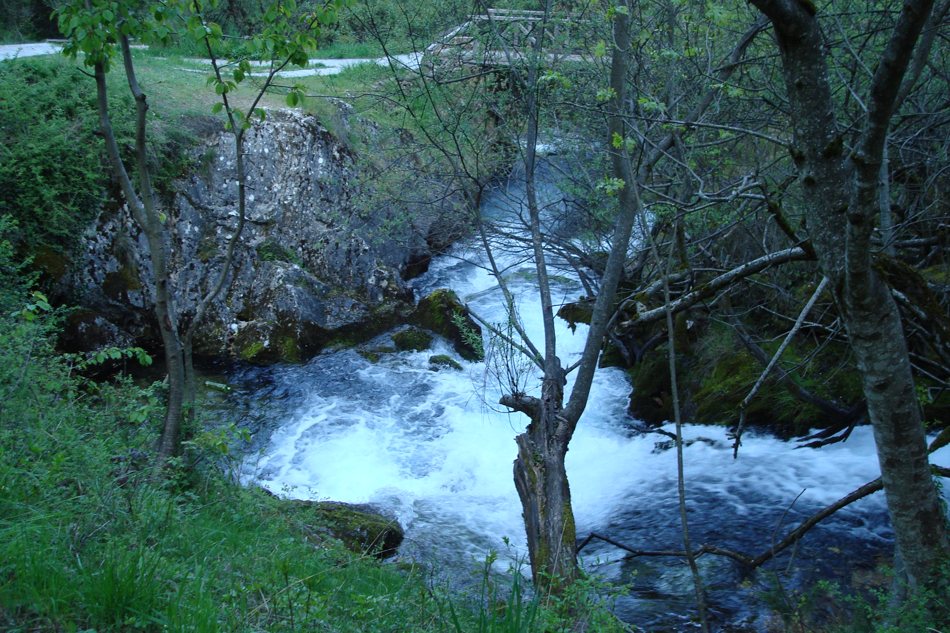 Вевчанските извори